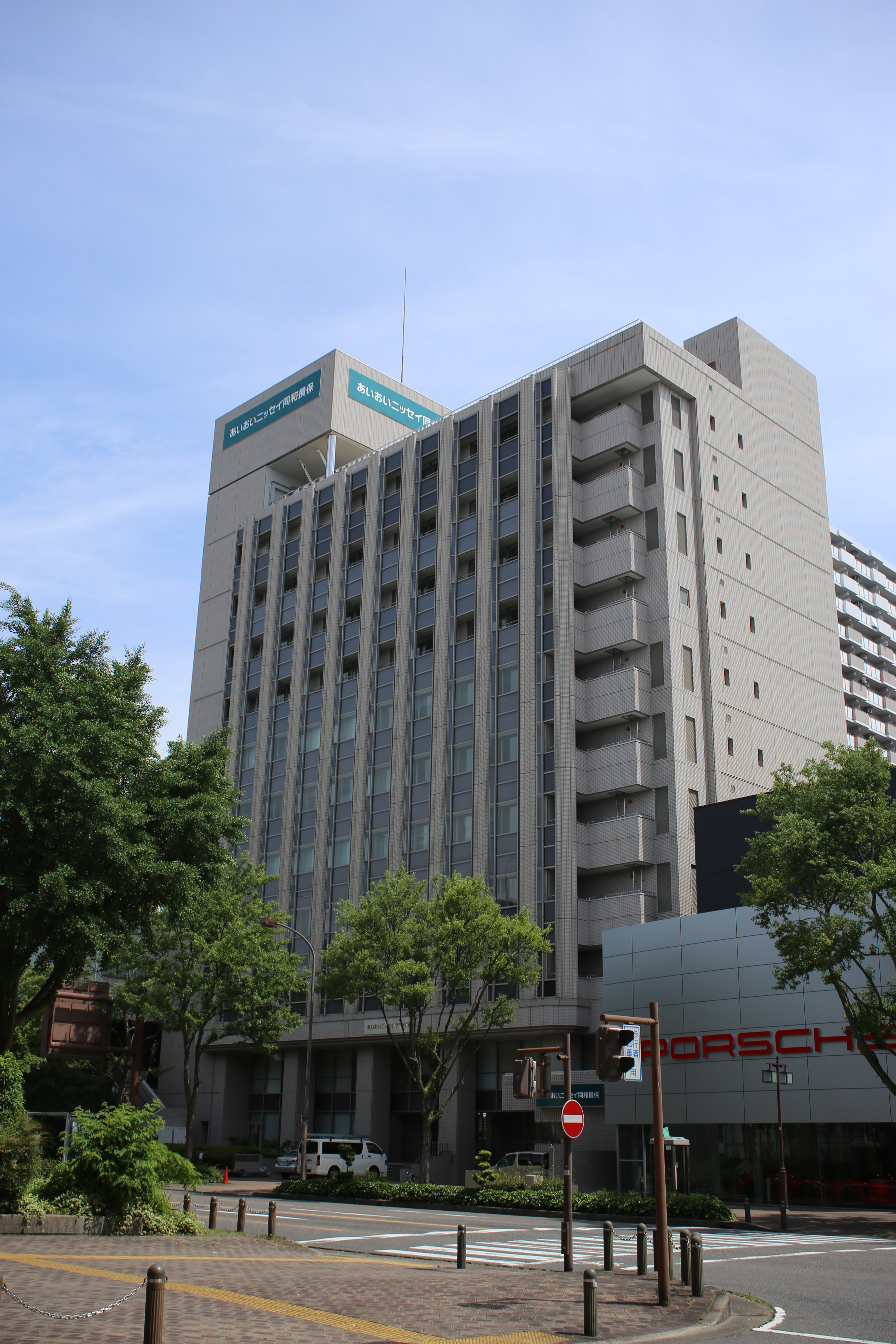 名古屋市中区千代田五丁目のあいおいニッセイ同和損保名古屋鶴舞ビルを北側公道西側より撮影